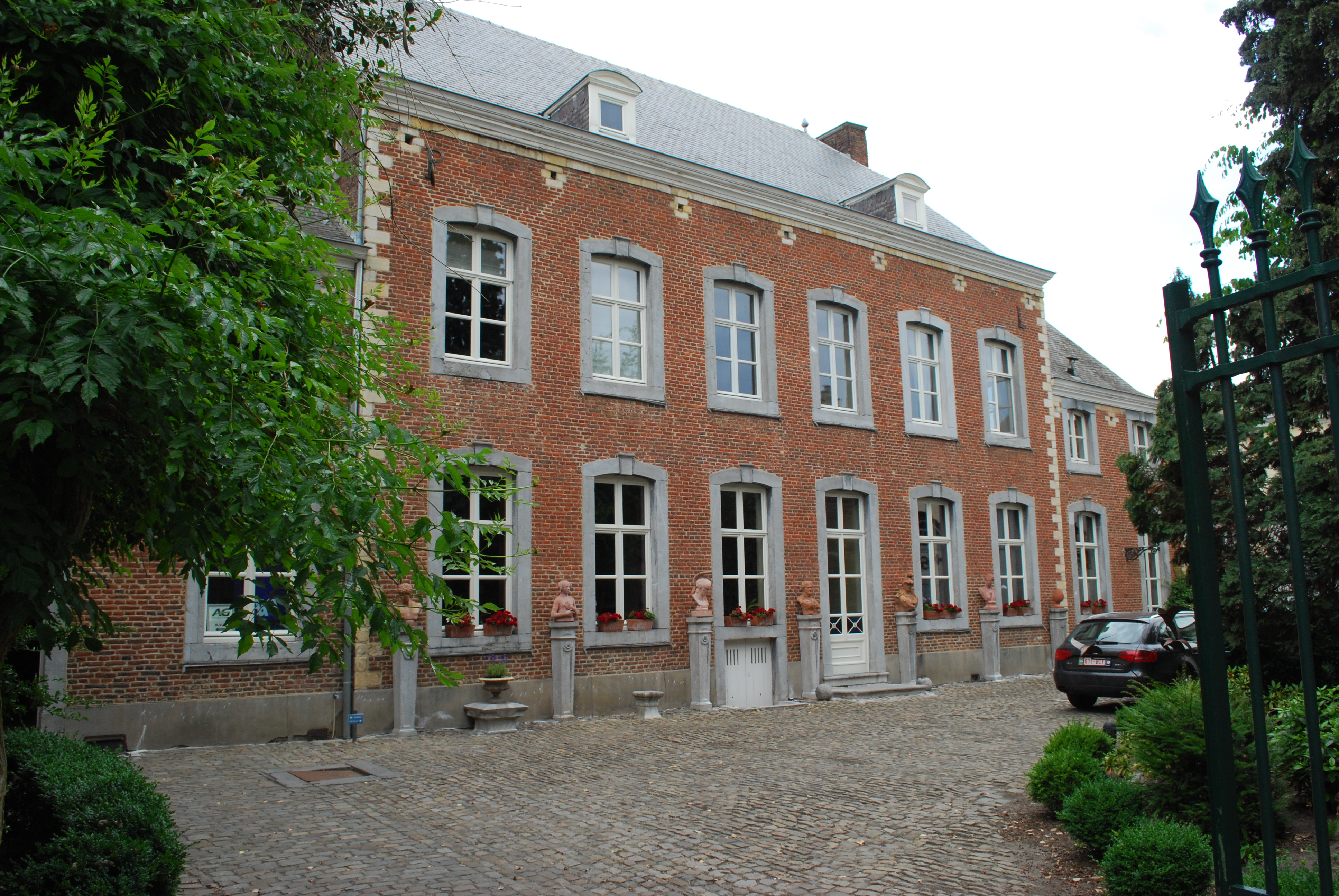 Tongres : maison canoniale (en néerl. Kanunikkenhuis) dans la Vermeulenstraat.